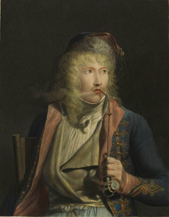 Portrait du peintre Jacques-Luc Barbier-Walbonne (1769-1860)